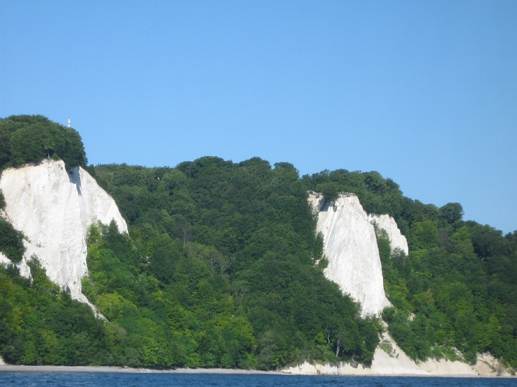 Stubbenkammer von der Ostsee aus gesehen